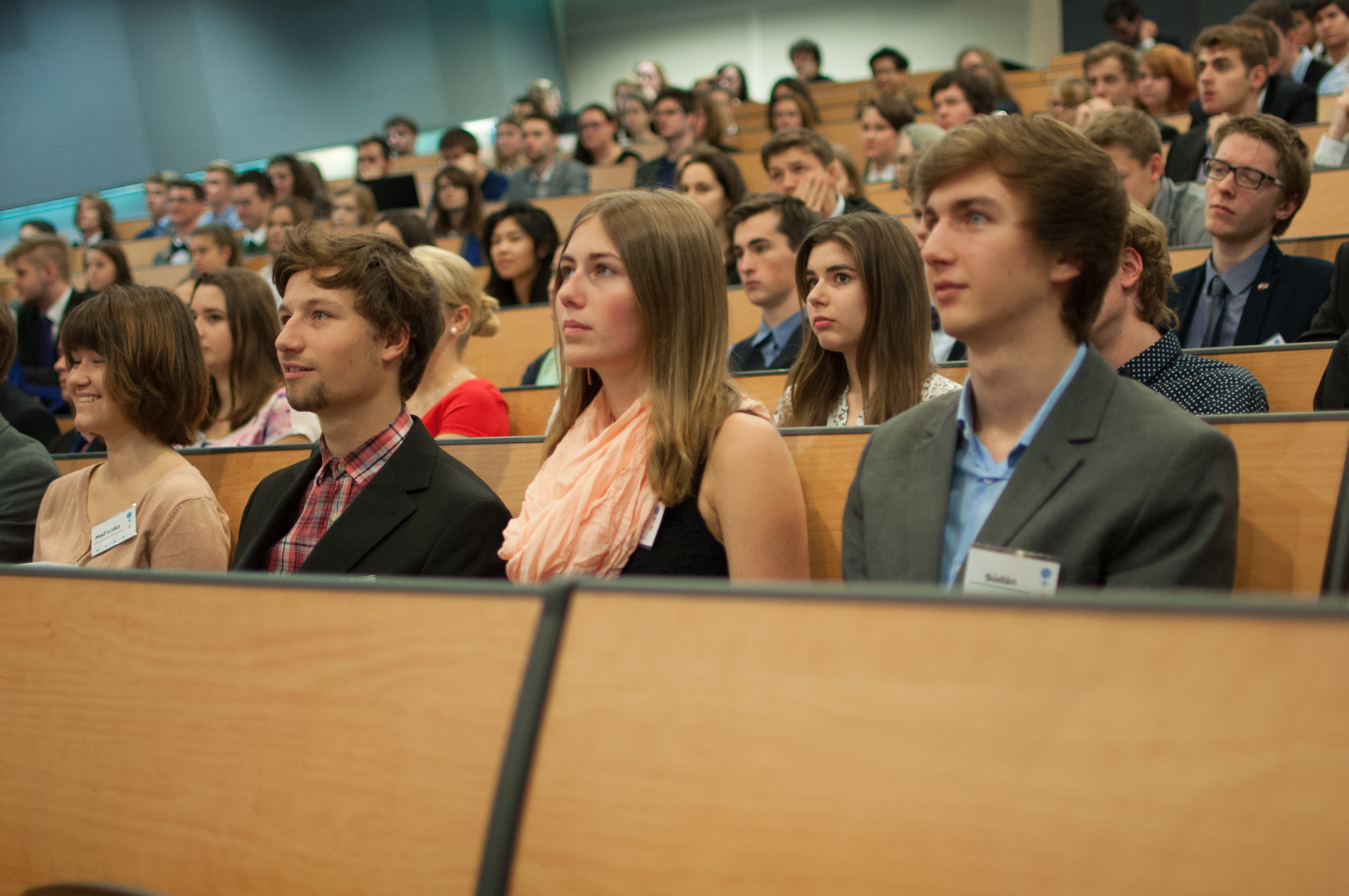 dopo program